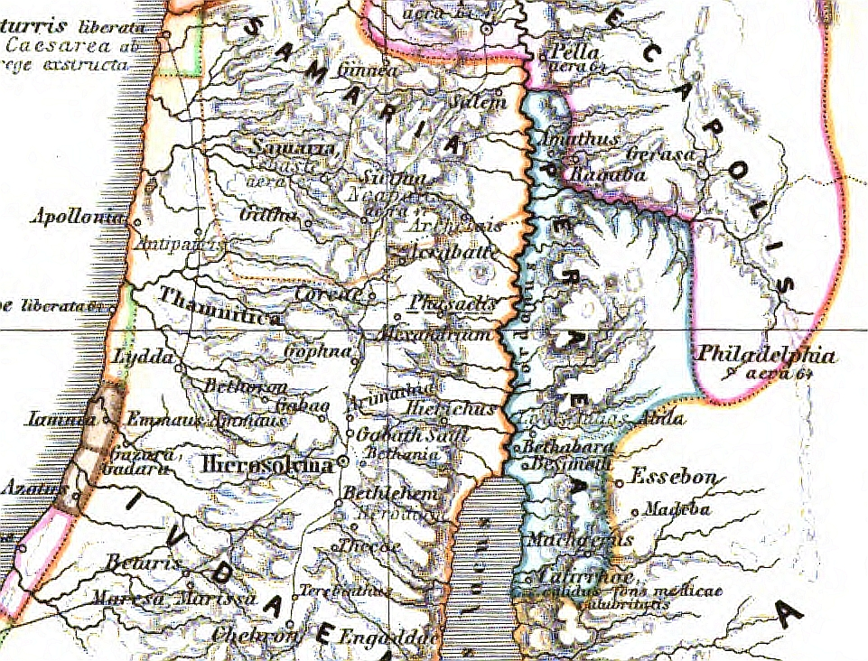 Peräa zur Zeit Herodes des Großen